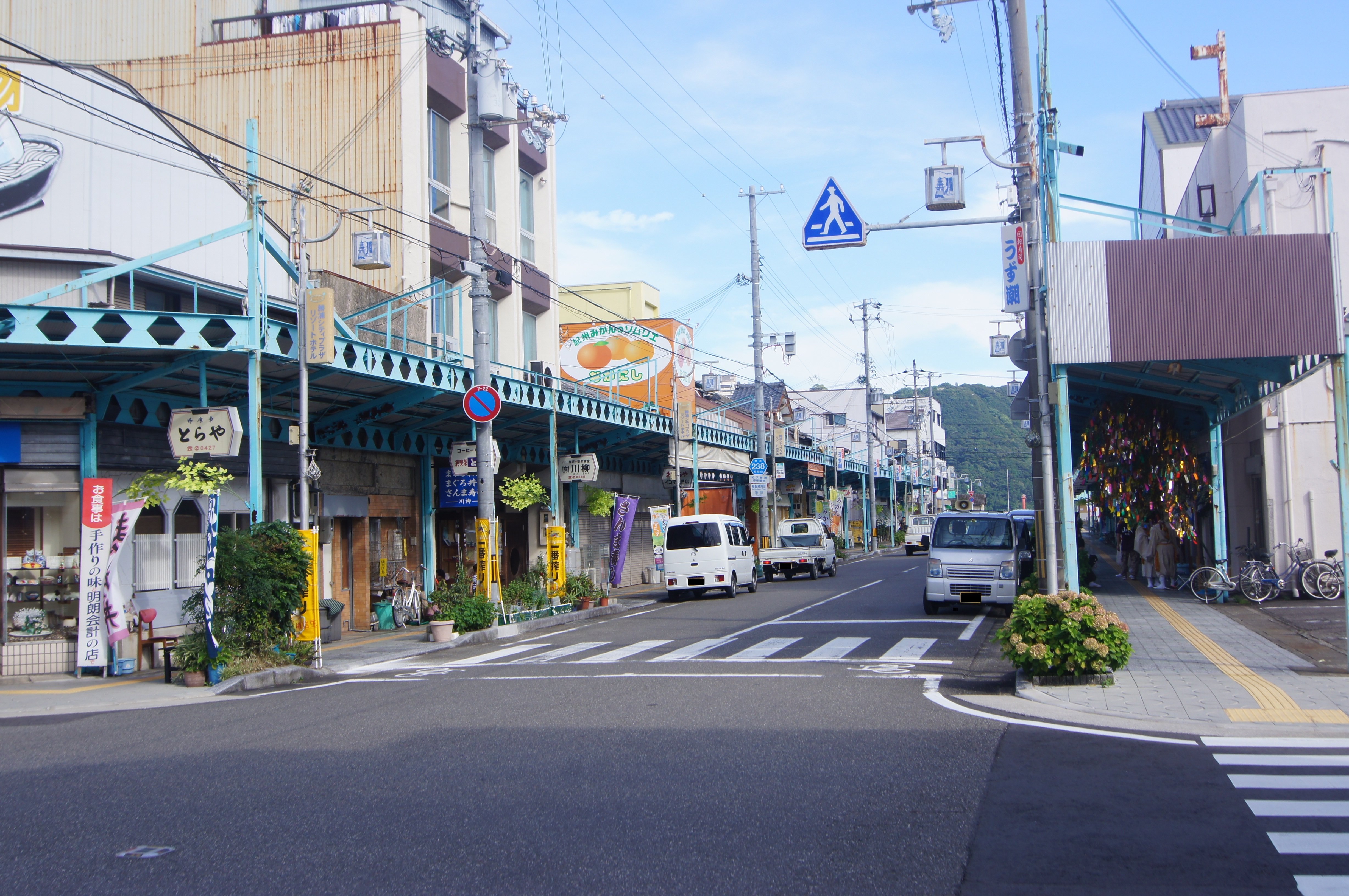 和歌山県道238号紀伊勝浦停車場線起点（紀伊勝浦駅前）